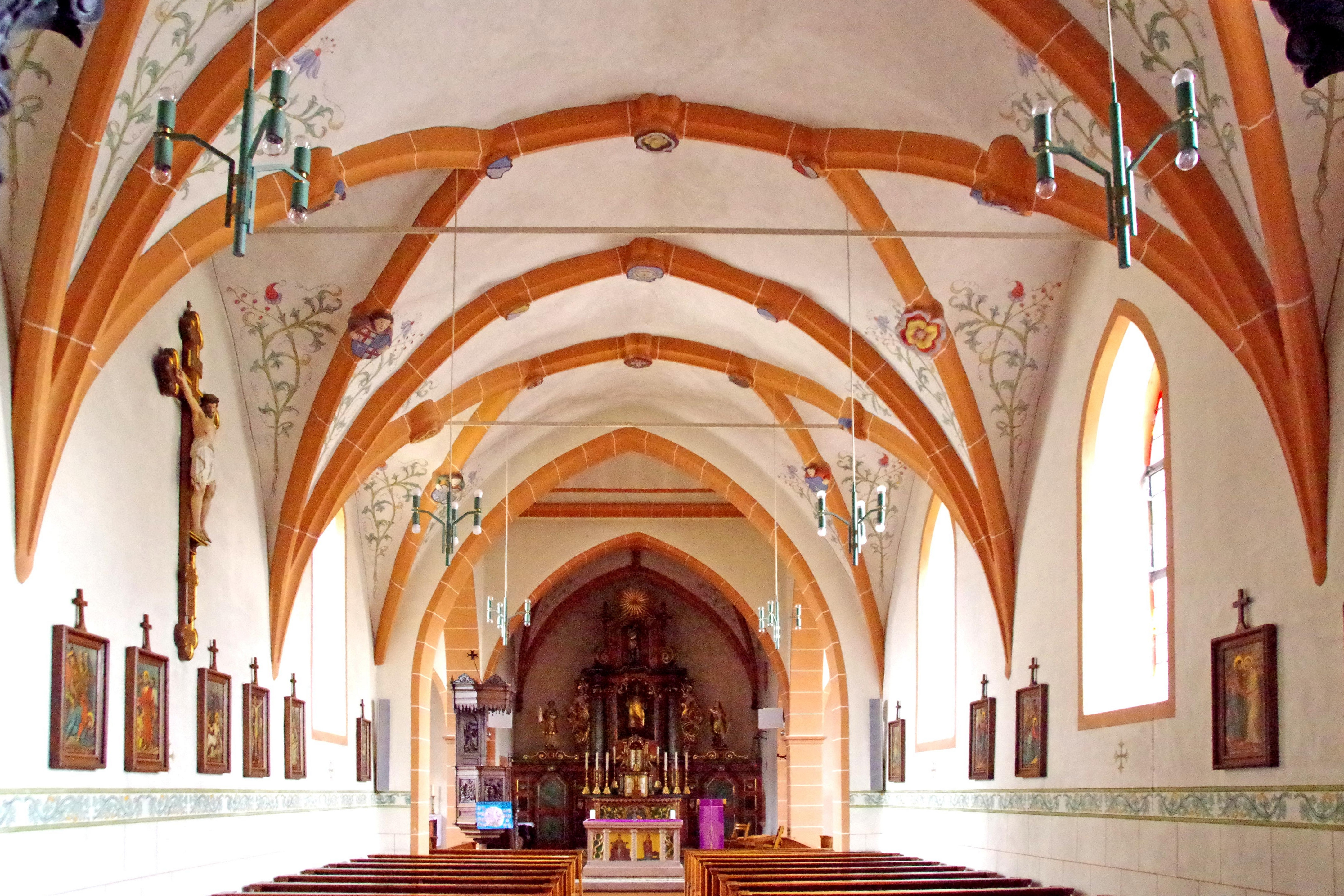 St. Maximin (Rommersheim), Kirchenschiff mit Hochaltar